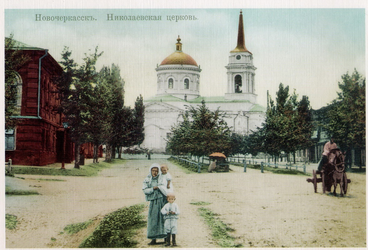 Николаевская церковь на дореволюционной открытке